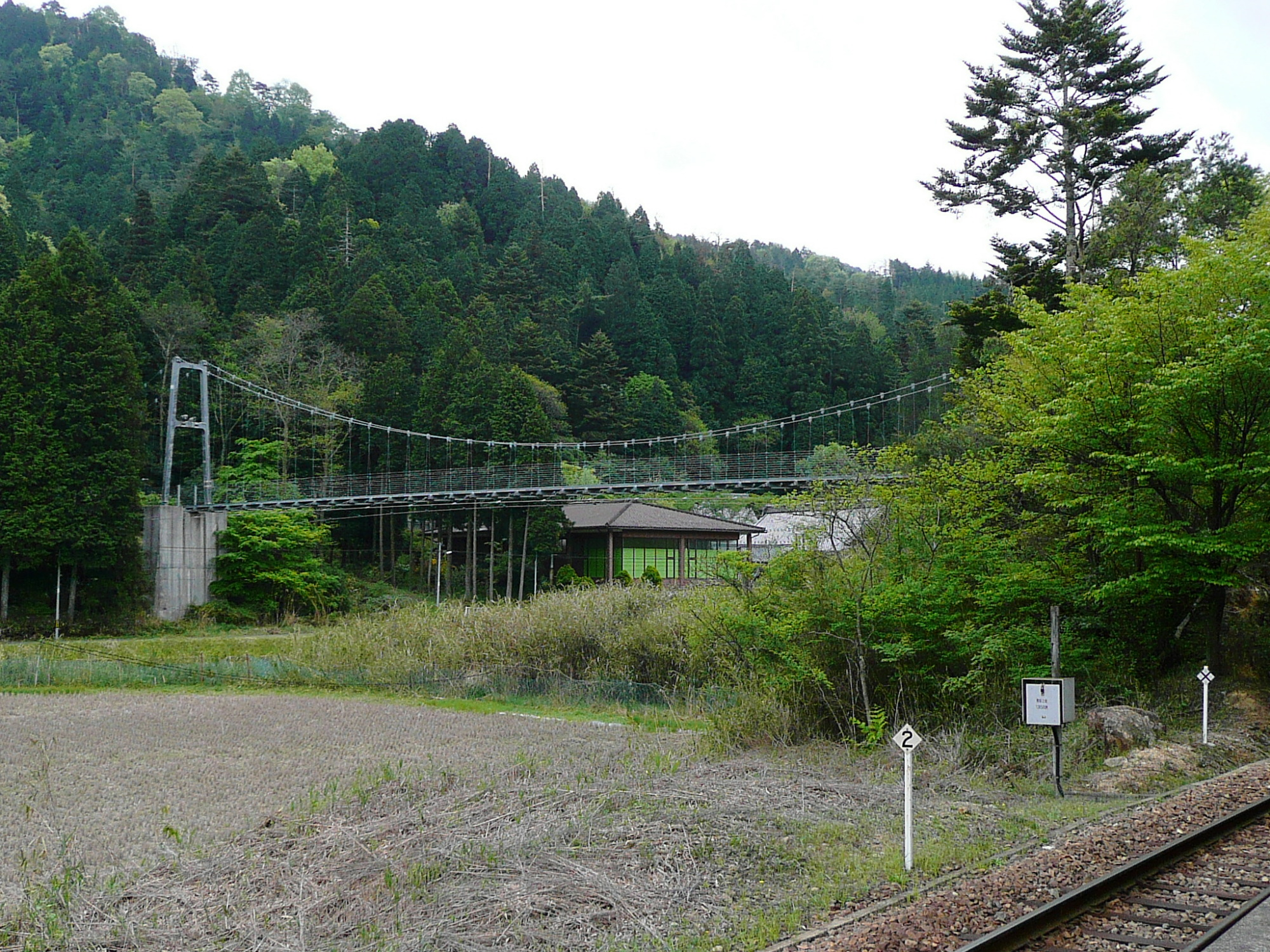 Hora-no-miya Bridre near Gyokukeijimae Station. / 信楽高原鐵道玉桂寺前駅ホームから望む「保良の宮橋」。右下が線路で、正面奥に見える建物が玉桂寺である。